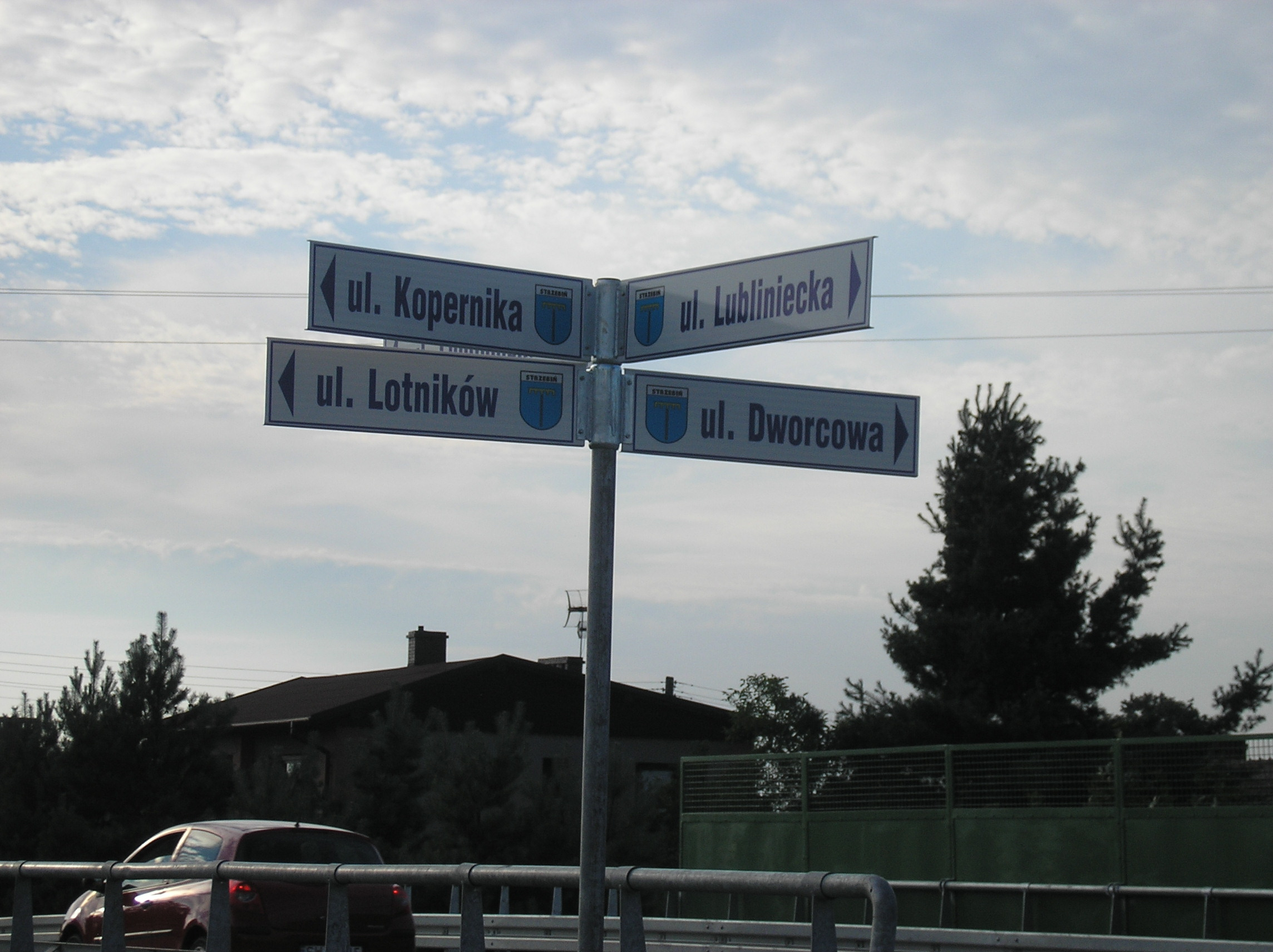 Strzebiński znak uliczny widziany na wiadukcie